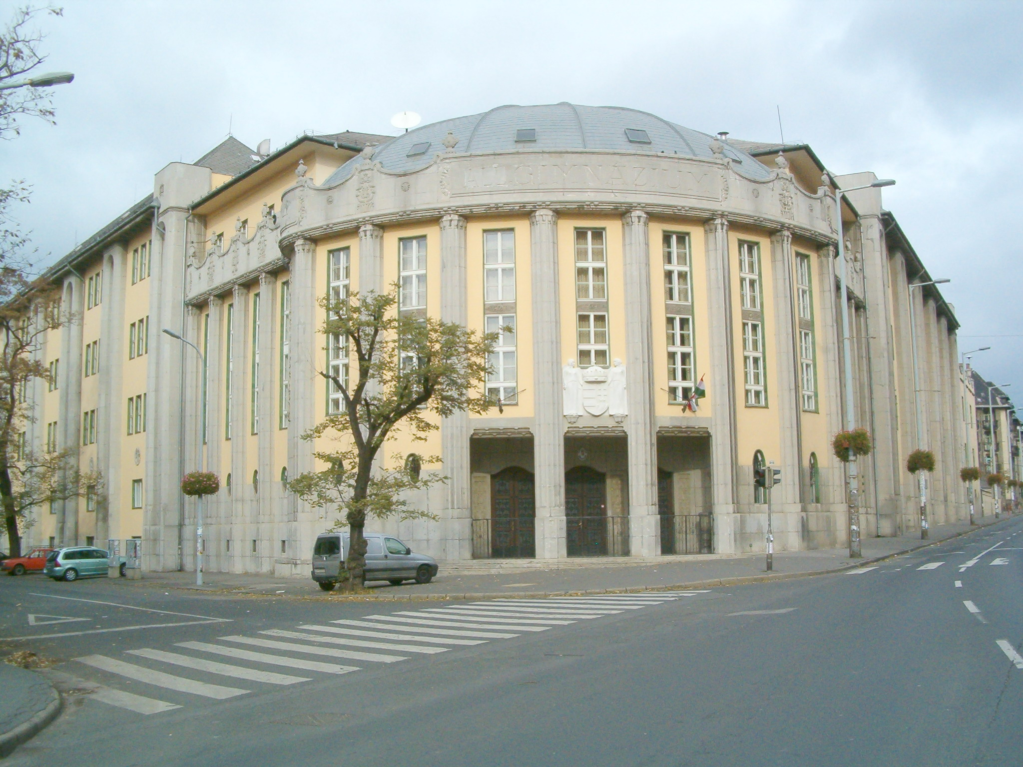 A Szent László Gimnázium épülete Budapest X. kerületében. Épült 1914-15-ben Lechner Ödön tervei szerint